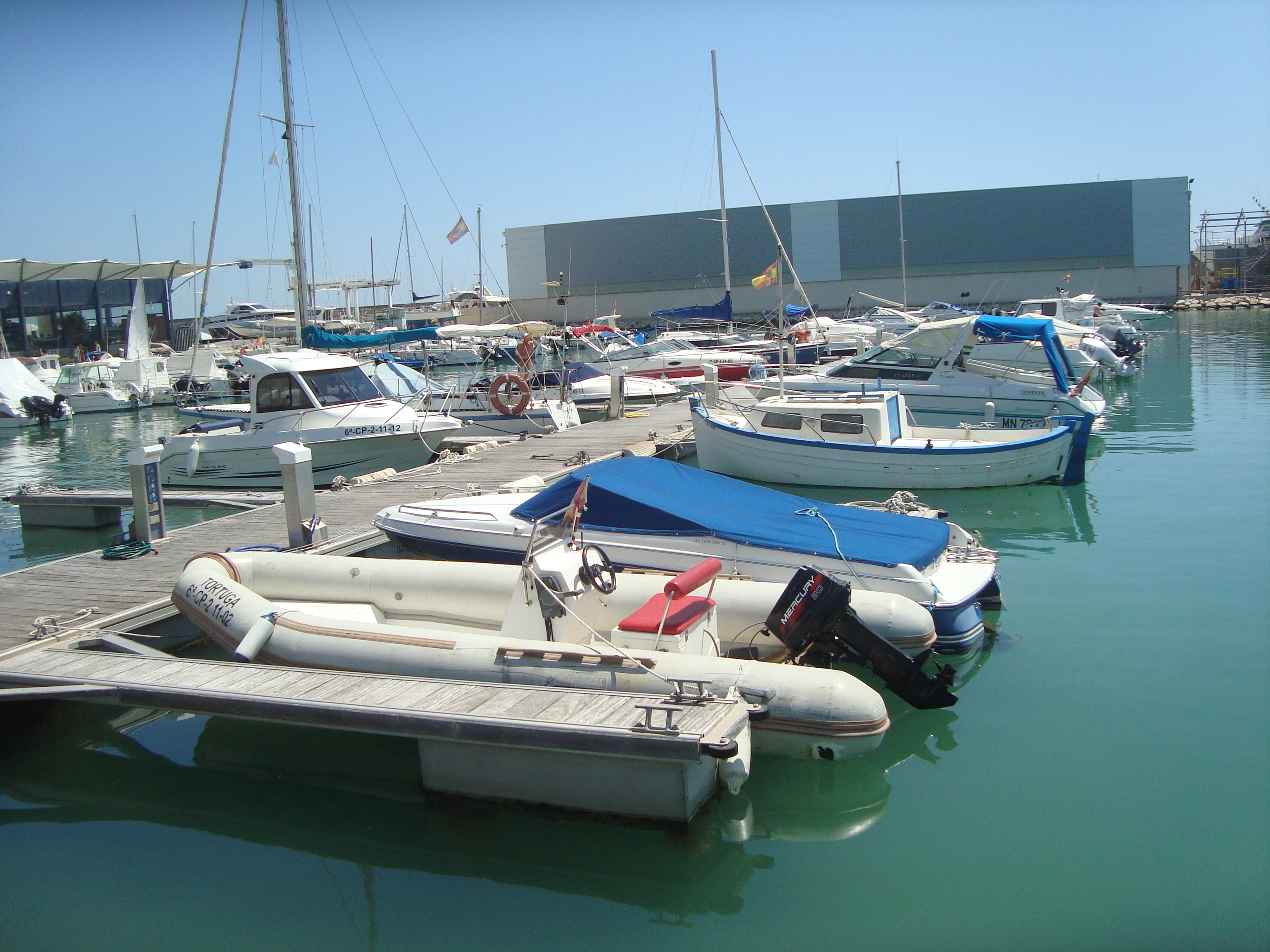 Port naútic, Port esportiu de Benicarló